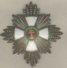 Magyar Érdemkereszt középkeresztje a csillaggal